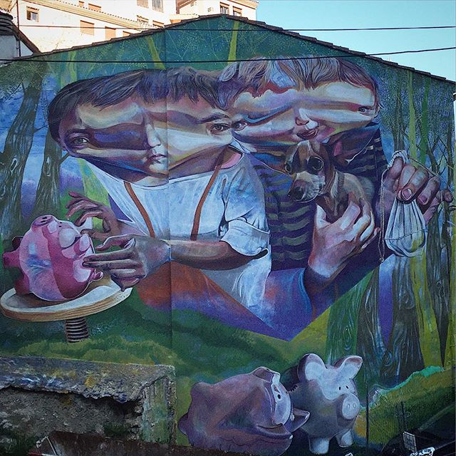 Mural de arte urbano del autor Mario Rodríguez (Puertollano, 1977) en el barrio de San Antón de Cuenca. El distrito acoge murales de esta disciplina que configuran una ruta con muestras de artistas españoles y europeos.